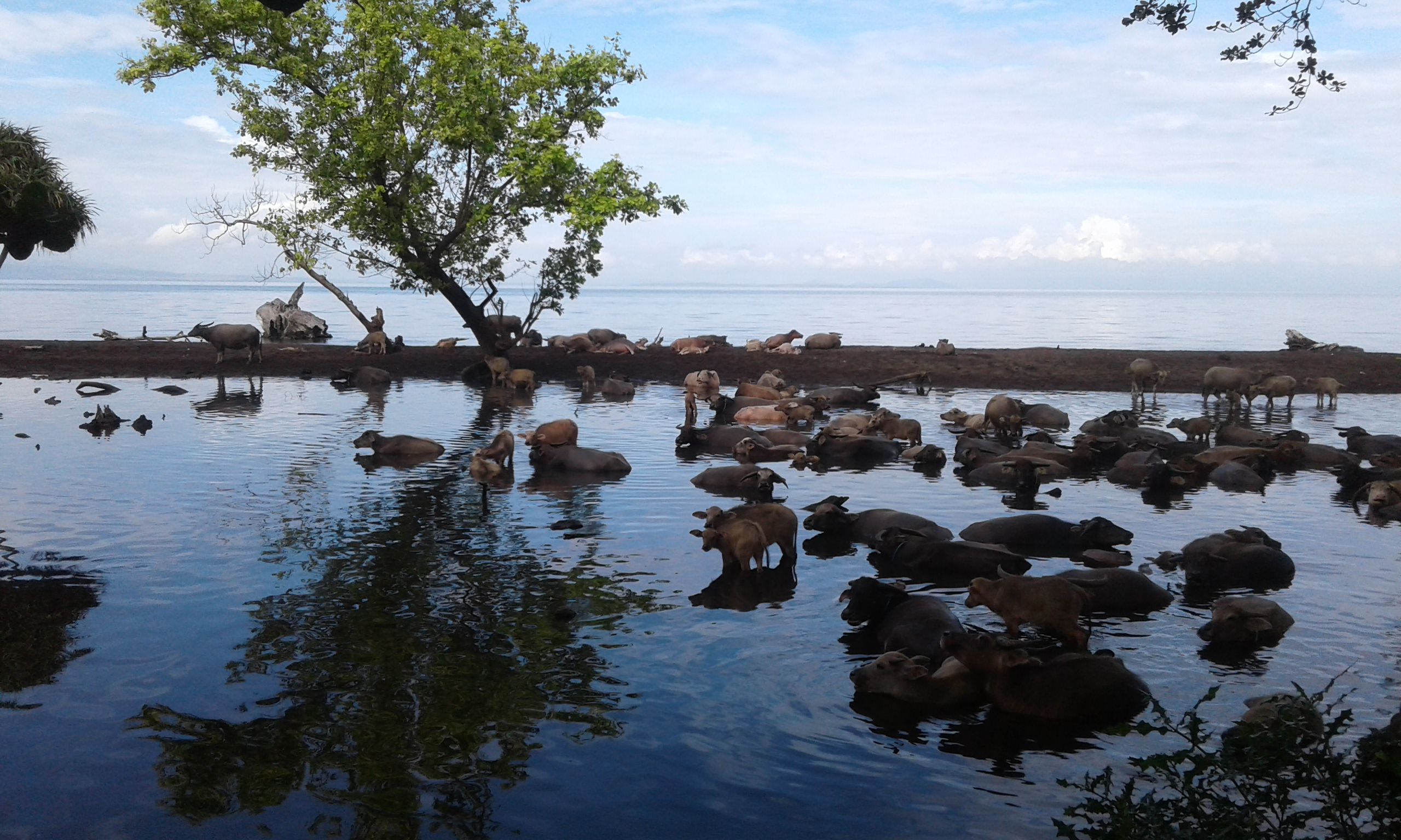 kerbau yang berendam berjam jam setelah lama mengarungi sabana nan luas di dompu seperti kuda nil menghabiskan banyak waktu di air hal seperti ini juga dapat dilihat di sepanjang piggiran sabana di dompu